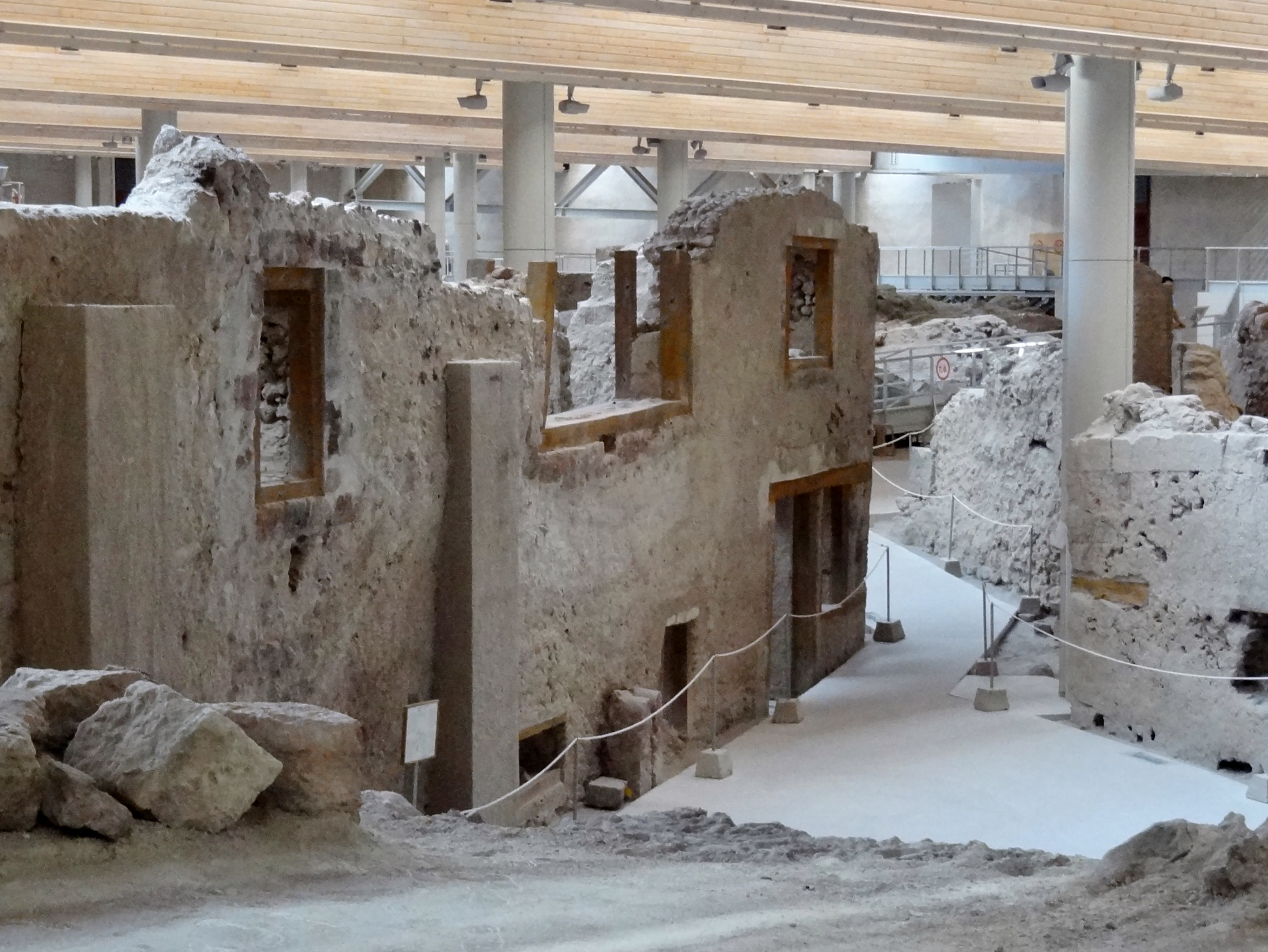 Ausgrabungsstätte von Akrotiri auf Santorin, Kykladen, Griechenland